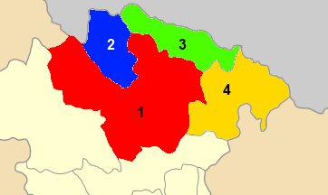 Χάρτης με τις ενότητες που αποτελούν τον Δήμο Μύκης